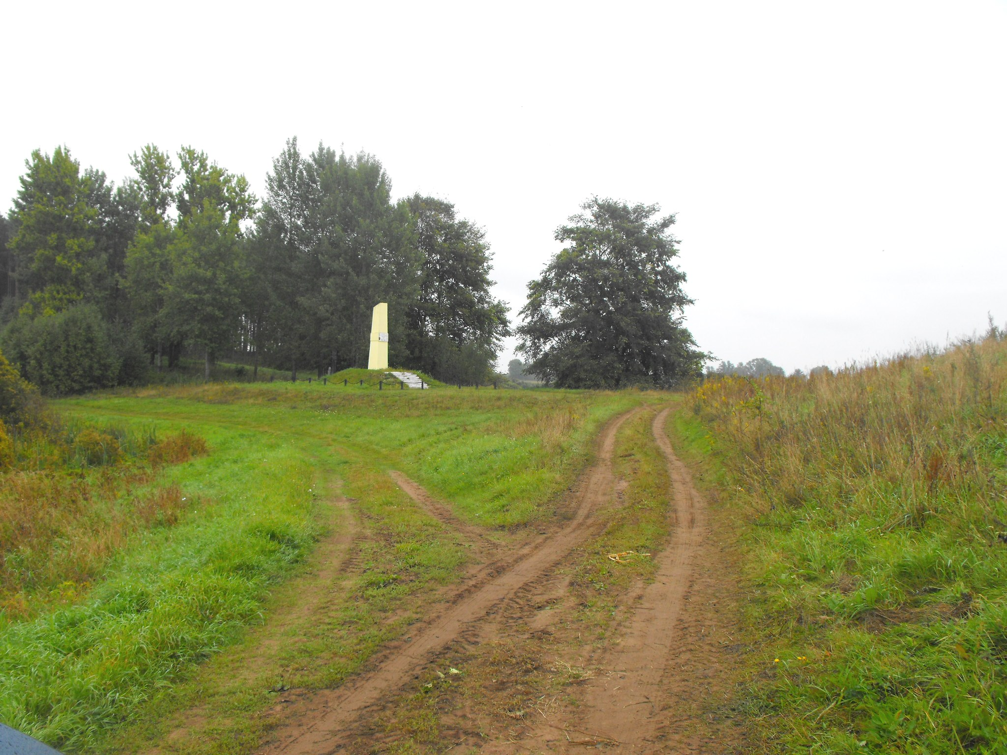 Памятник евреям из гетто в Чашниках, убитых нацистами и коллаборационистами. Установлен в деревне Заречная Слобода (Чашникский район, Витебская область).